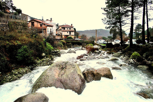 Rio